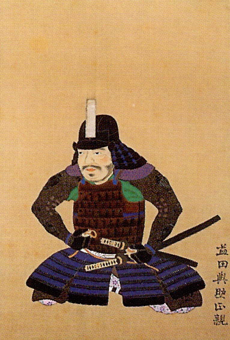 益田正親の肖像。